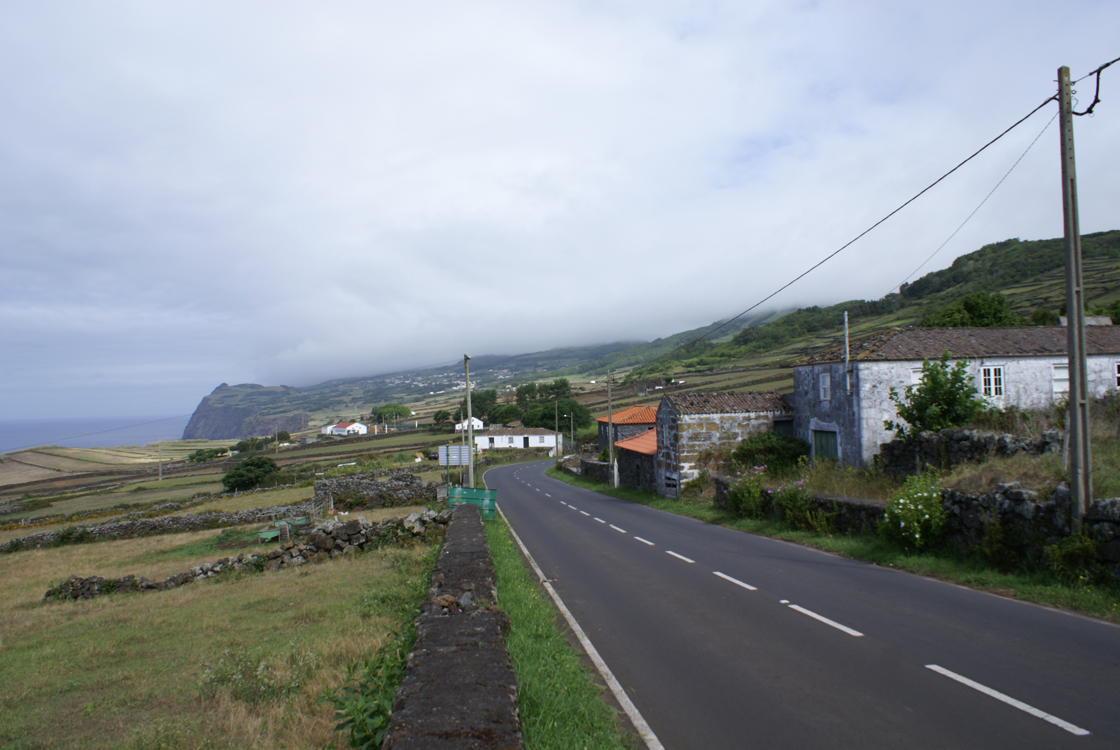 Uma paisagem dos Rosias, Velas, ilha de São Jorge, Açores